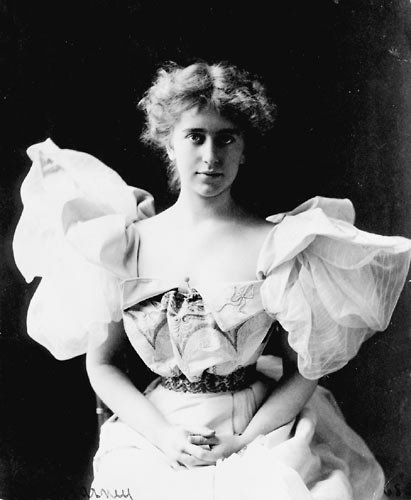 Photographie de Frances Benjamin Powers, entre 1890 et 1910. Washington DC, Library of Congress, Prints and Photographs Division.